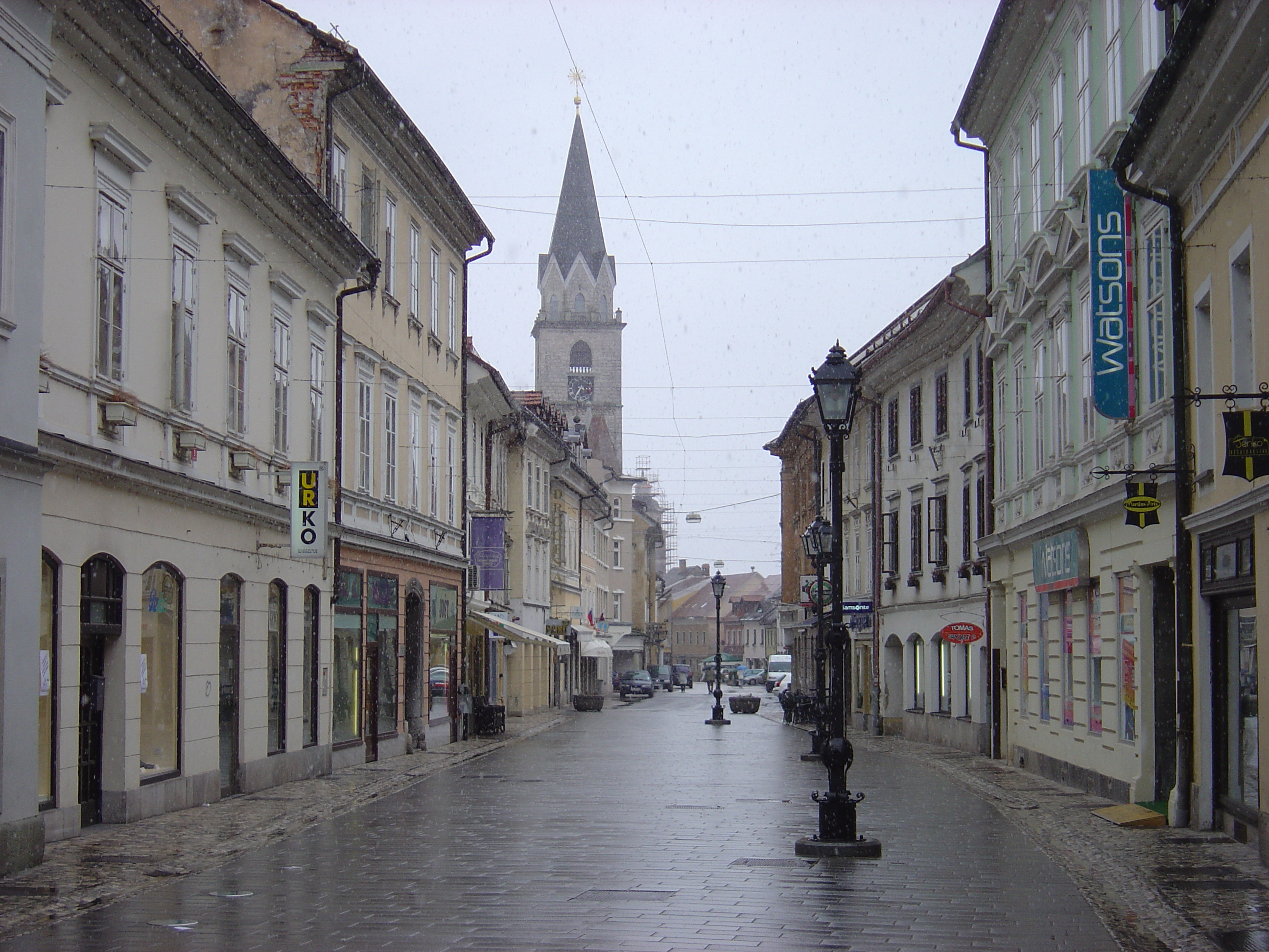 Kranj, Slovenia